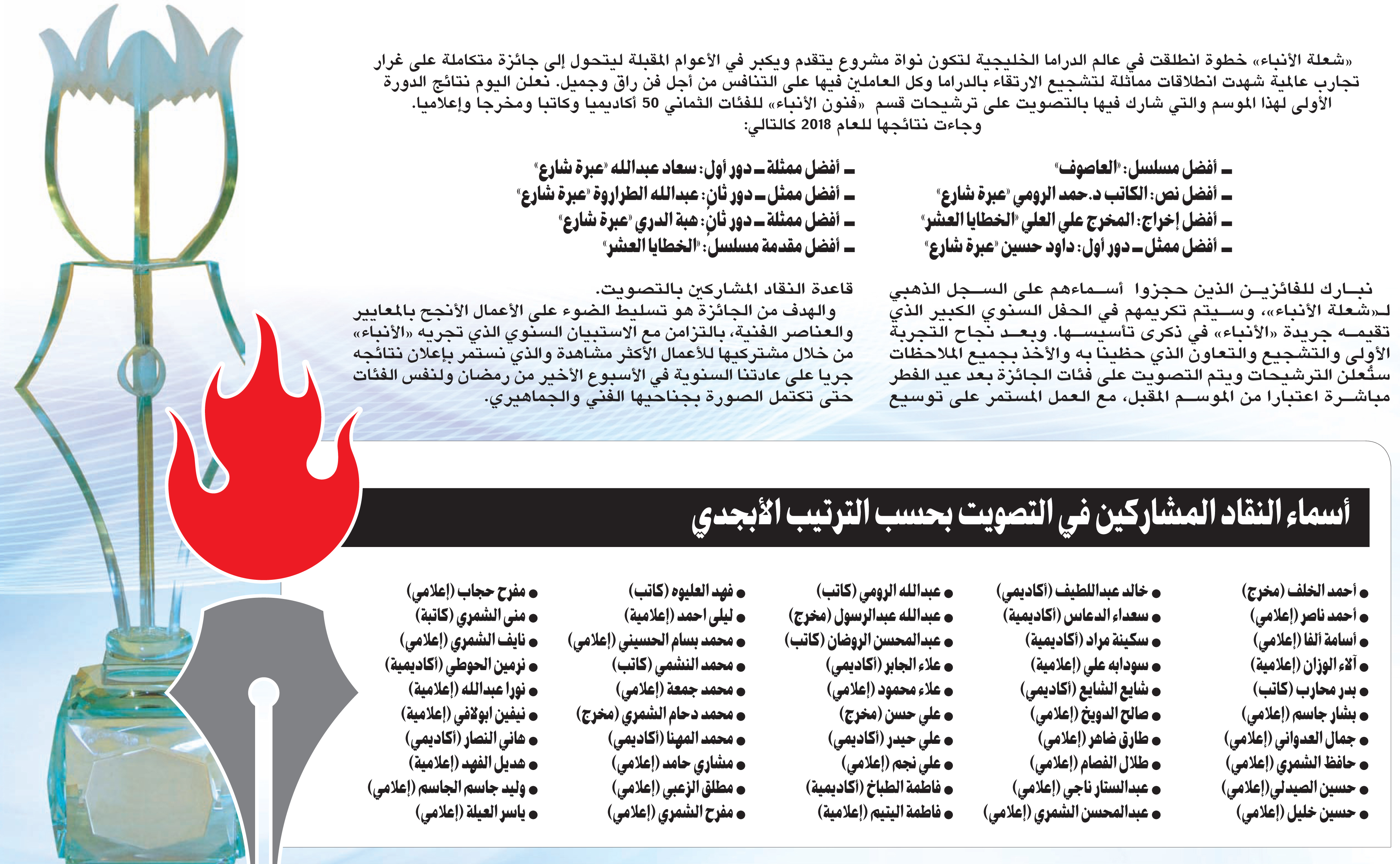 اسماء النقاد والخبراء المشاركين في اختيار ترشيحات جائزة شعلة الانباء لدورها الاولى للعام 2018